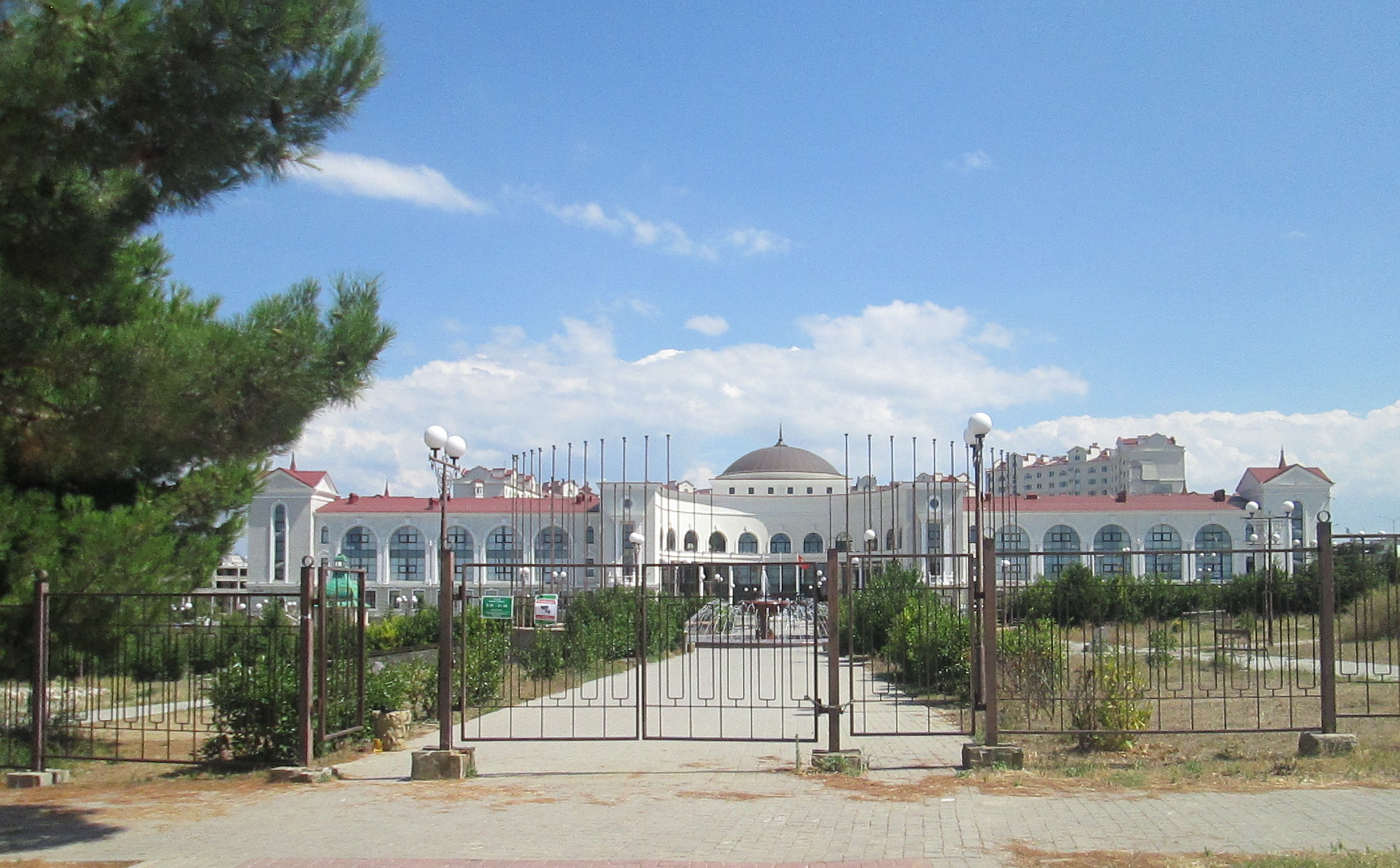 Вхід до студентського парку в Севастополі зі сторони парку Перемоги